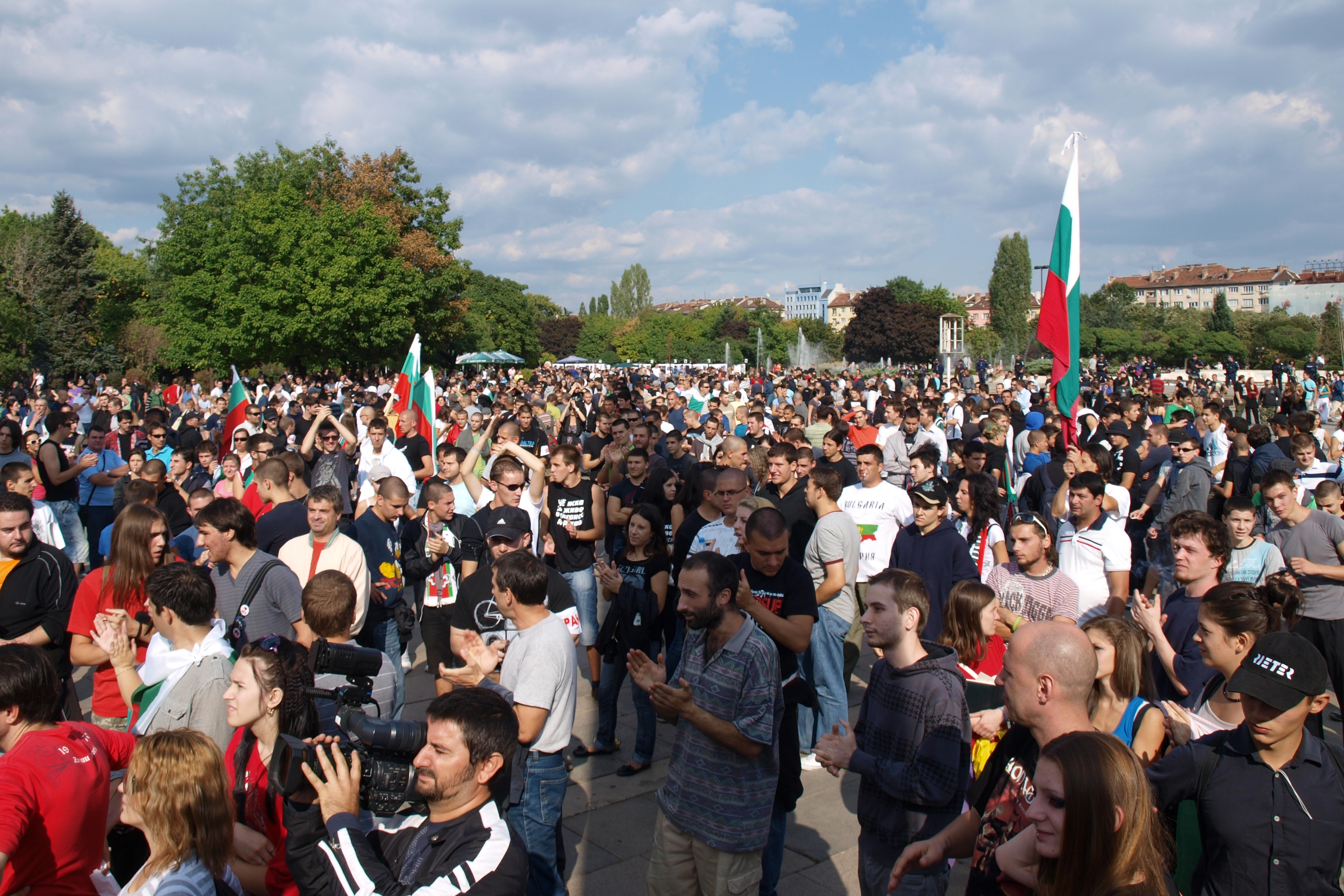 Протест срещу циганската престъпност в София.